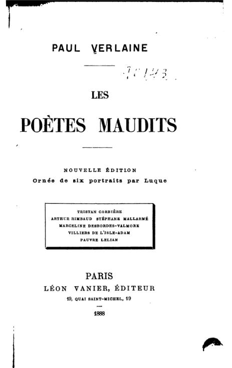 Les Poètes maudits (edition 1888)